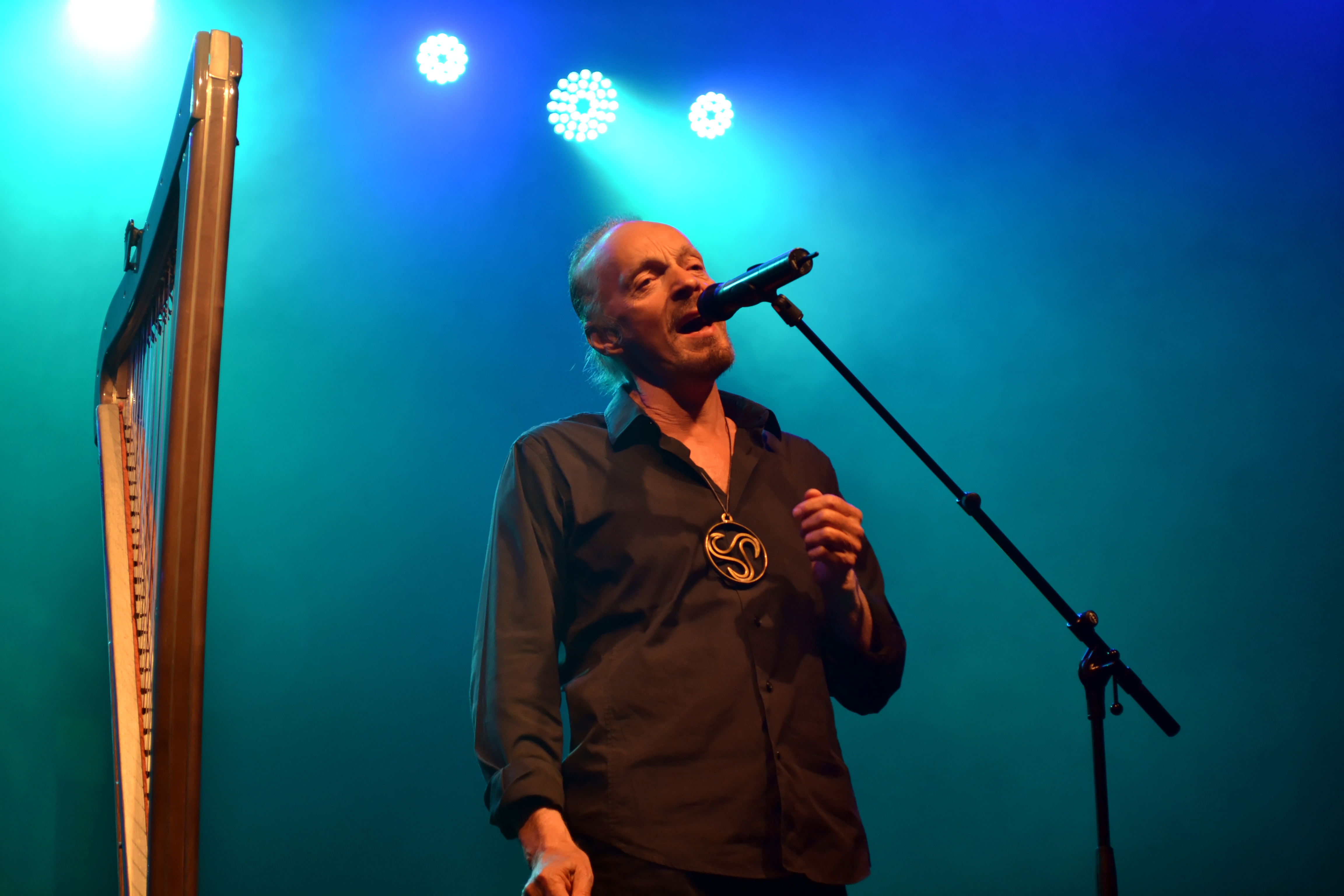 Alan Stivell en concert gratuit lors des Jeudis du port à Brest le 15 août 2013.